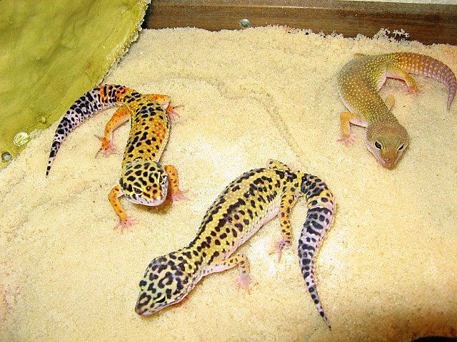 Eublepharis macurius